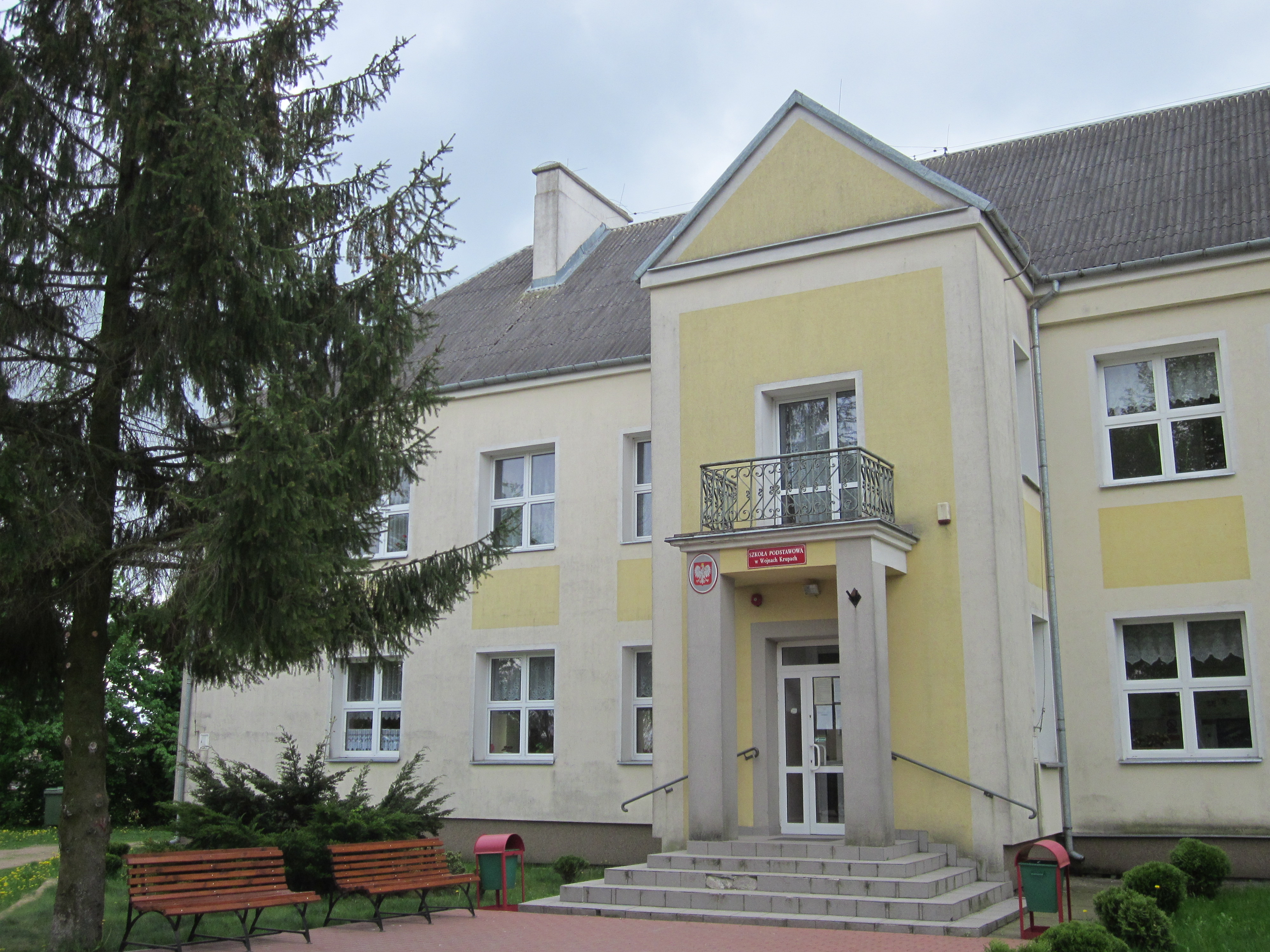 Jedna z 5 szkół podstawowych z terenu gminy Szepietowo.